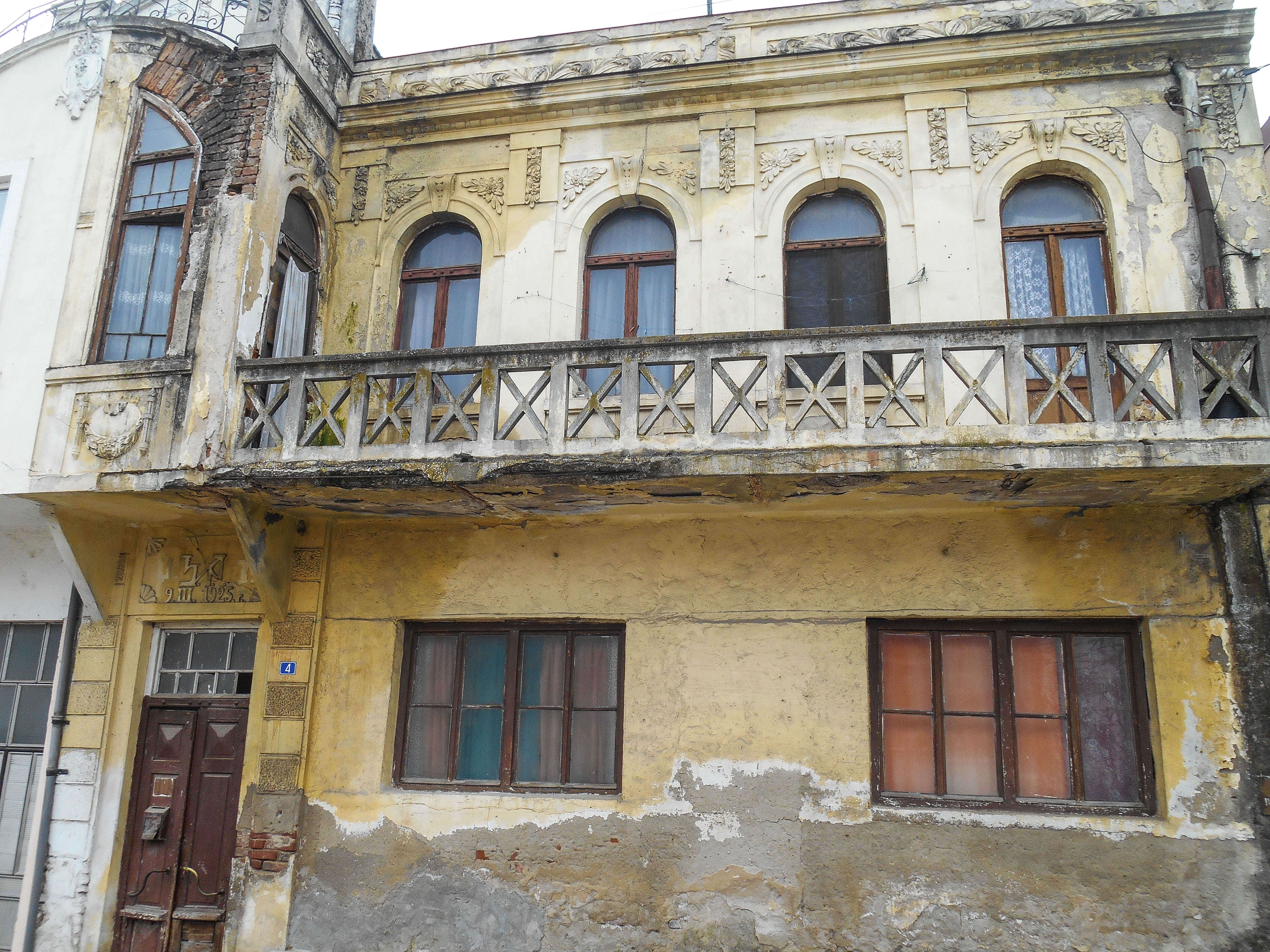 Куќа во Струмица